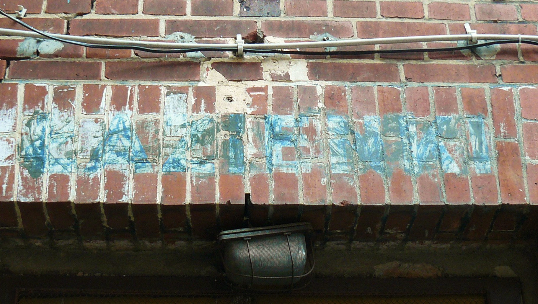 Szkołą przy ul. Słowackiego 54/60 w Poznaniu.